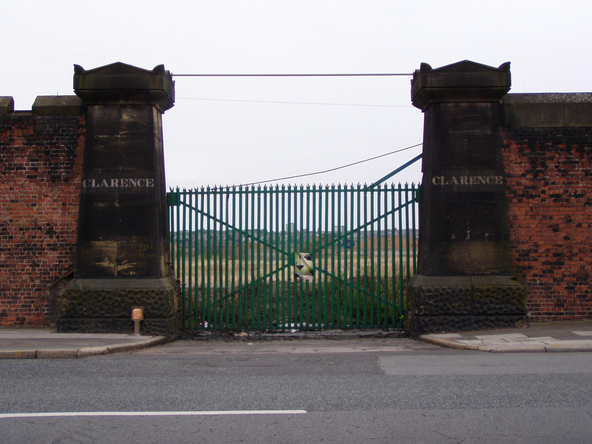 Enterance to Clarence docks